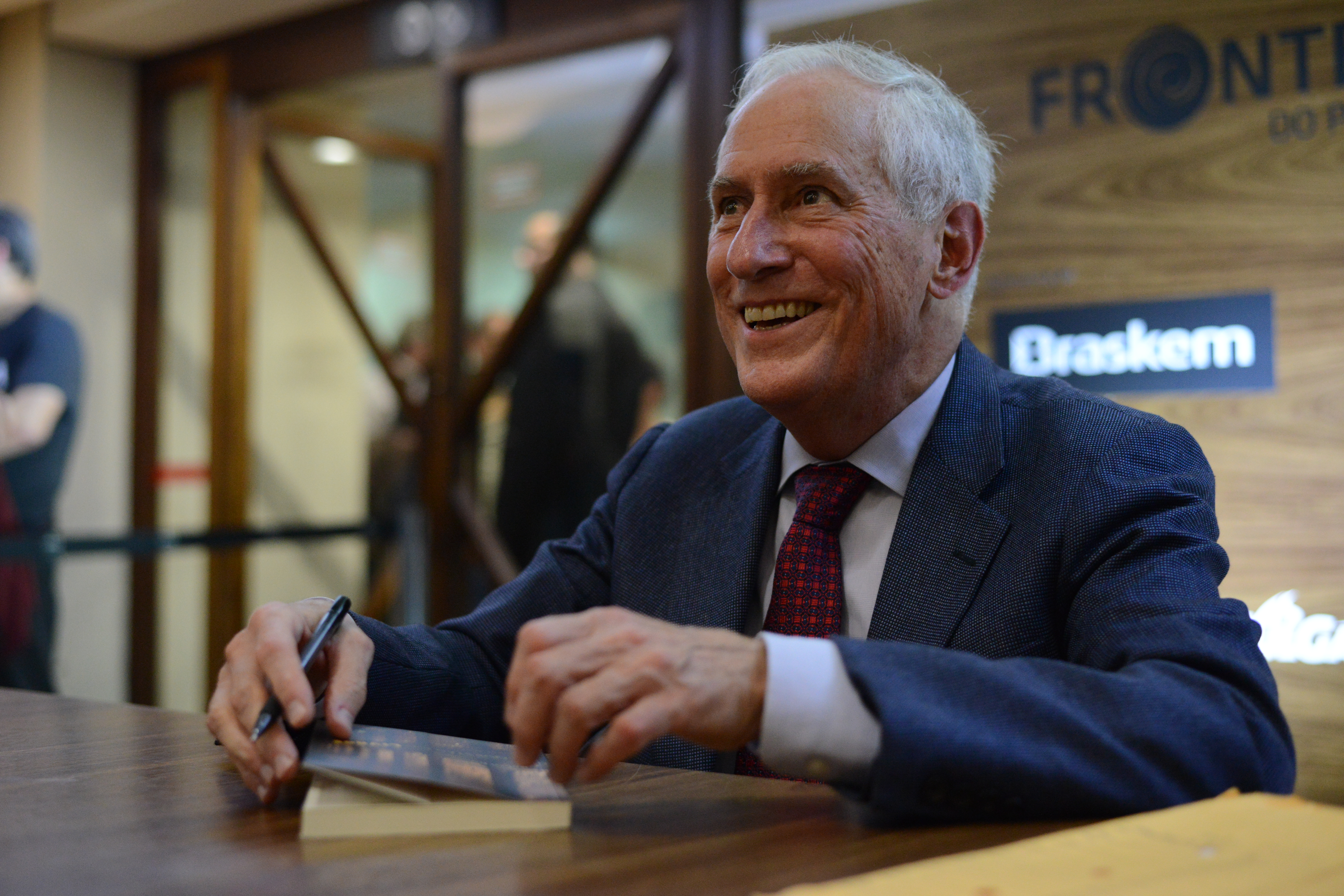 Convidado: Robert Darnton, historiador norte-americano Data: 29 agosto de 2016 Crédito das imagens: Fronteiras do Pensamento | Luiz Munhoz